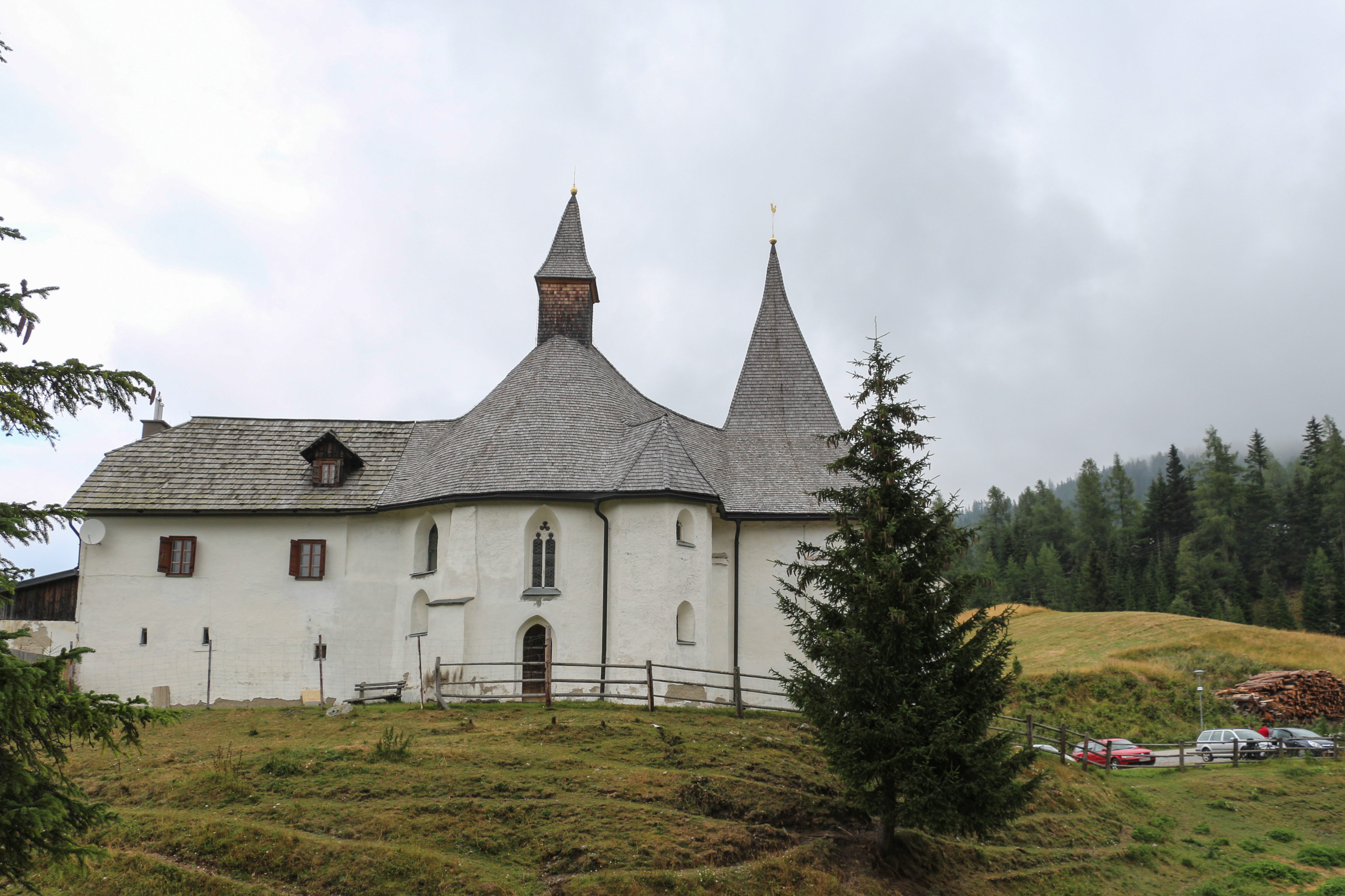 Filialkirche heiliger Johannes der Täufer (Flattnitz) - Glödnitz, Kärnten